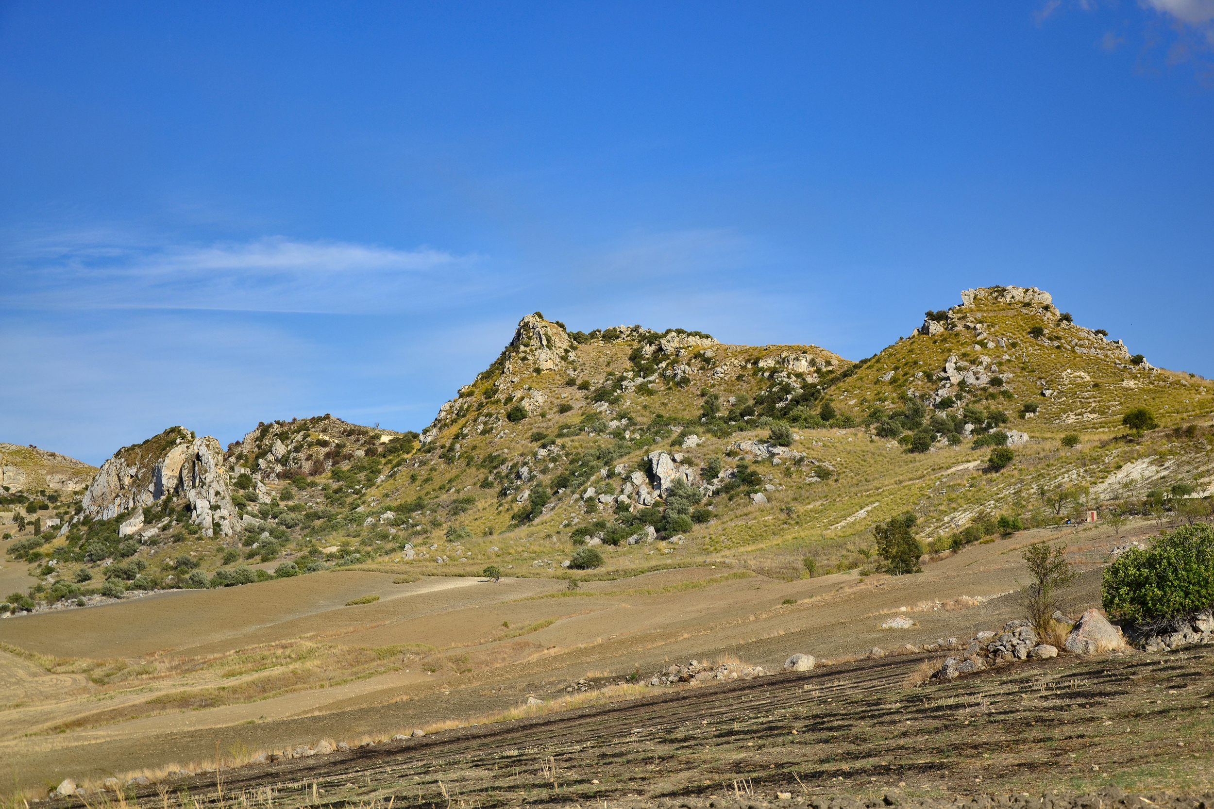 Sito archeologico Tornambè This is a photo of a monument which is part of cultural heritage of Italy.